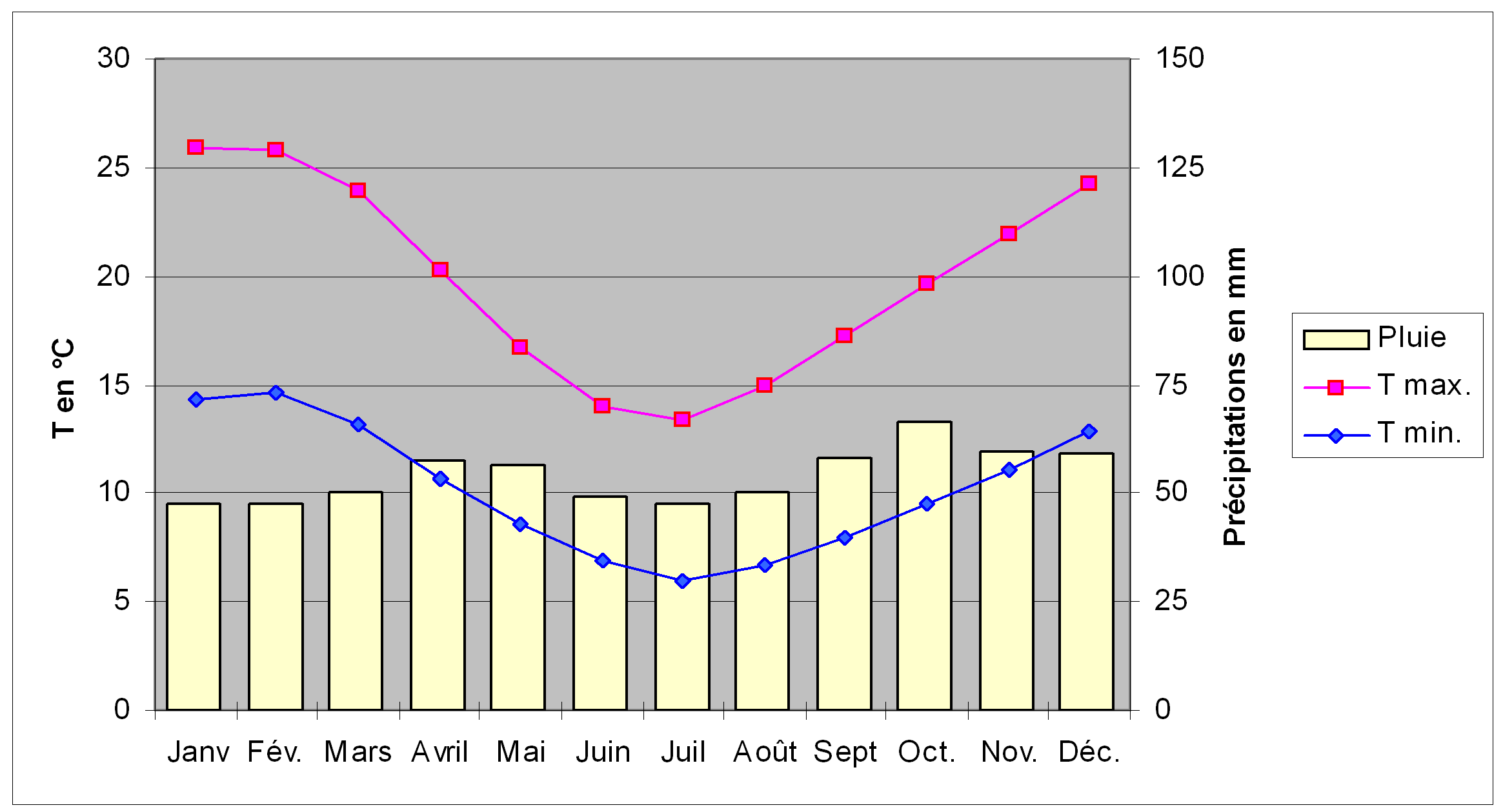 Diagramme climatique de la ville de Melbourne (Australie), comprenant deux courbes, représentant les températures maximales et minimales, et un histogramme, représentant la pluviométrie, pour les douze mois de l'année.